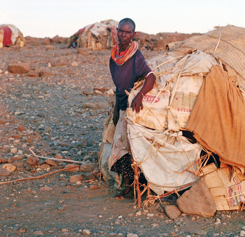 El molo